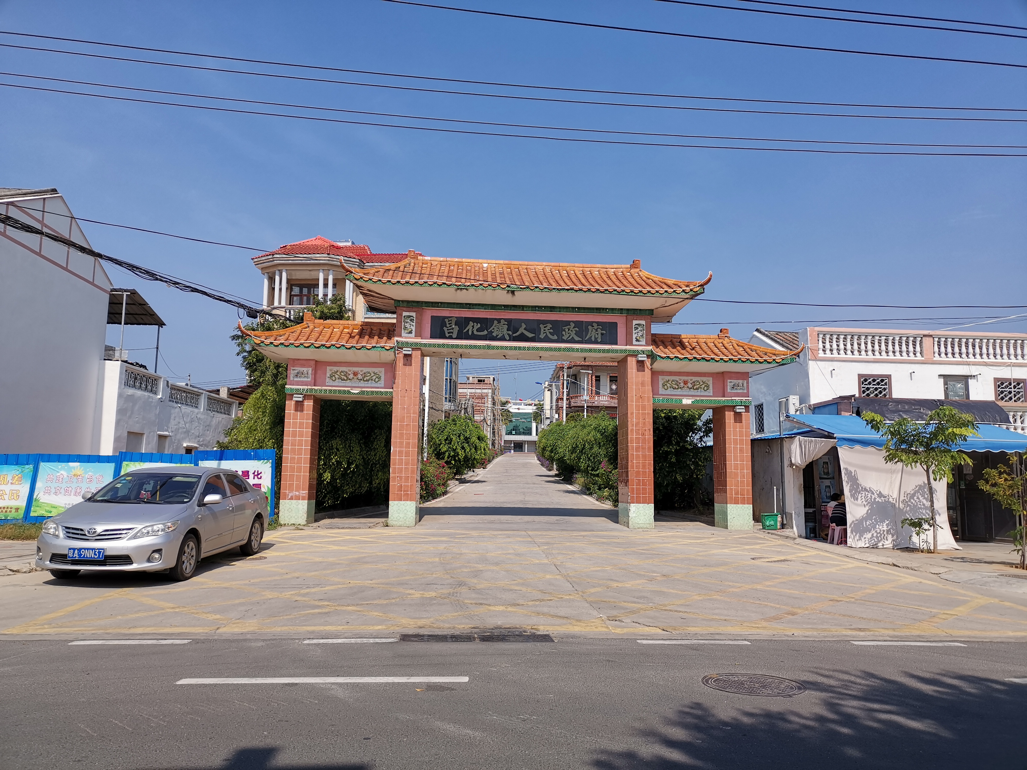 中文（中国大陆）: 昌江县主干道面貌